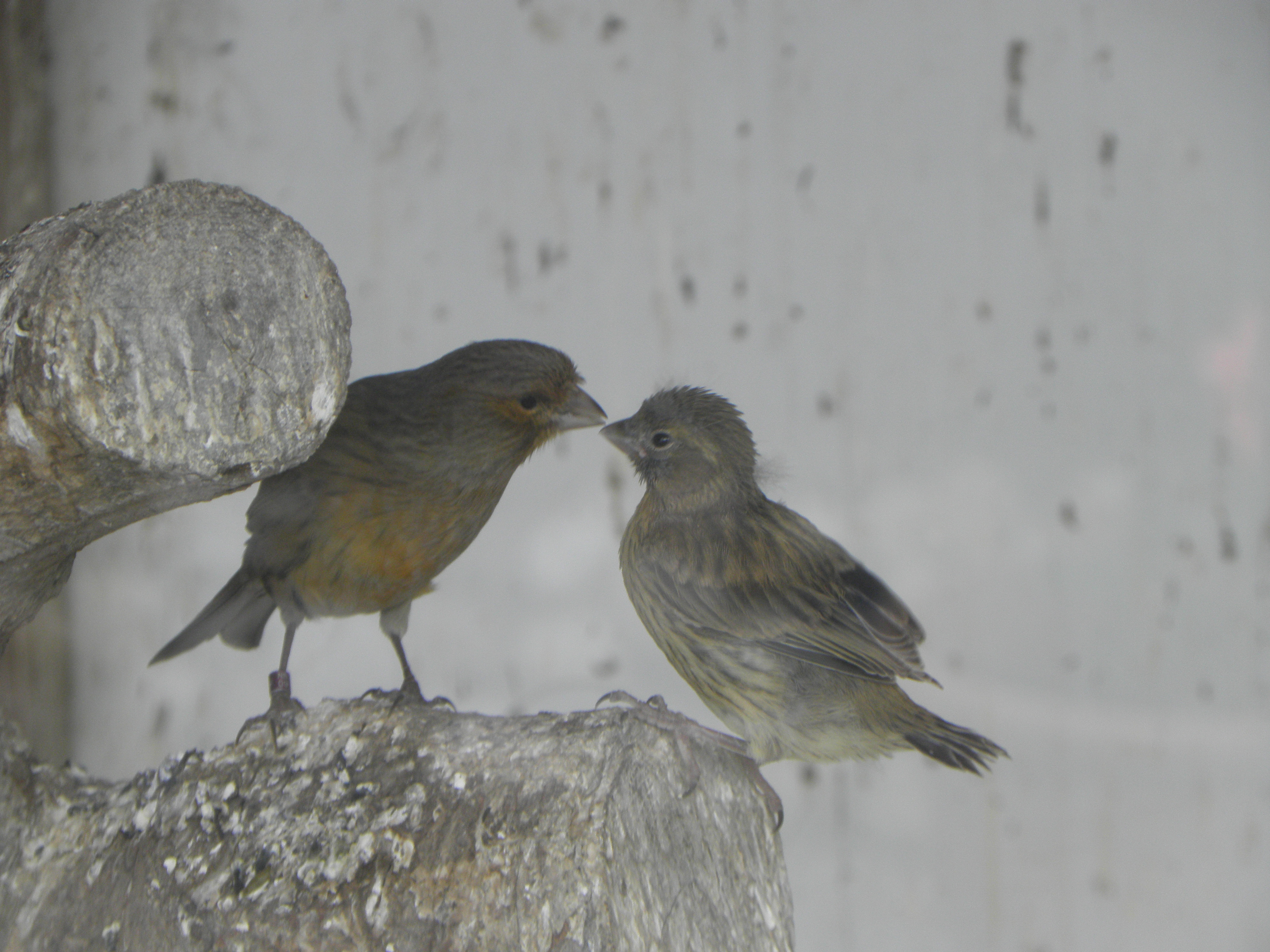 Serinus canaria kanarie